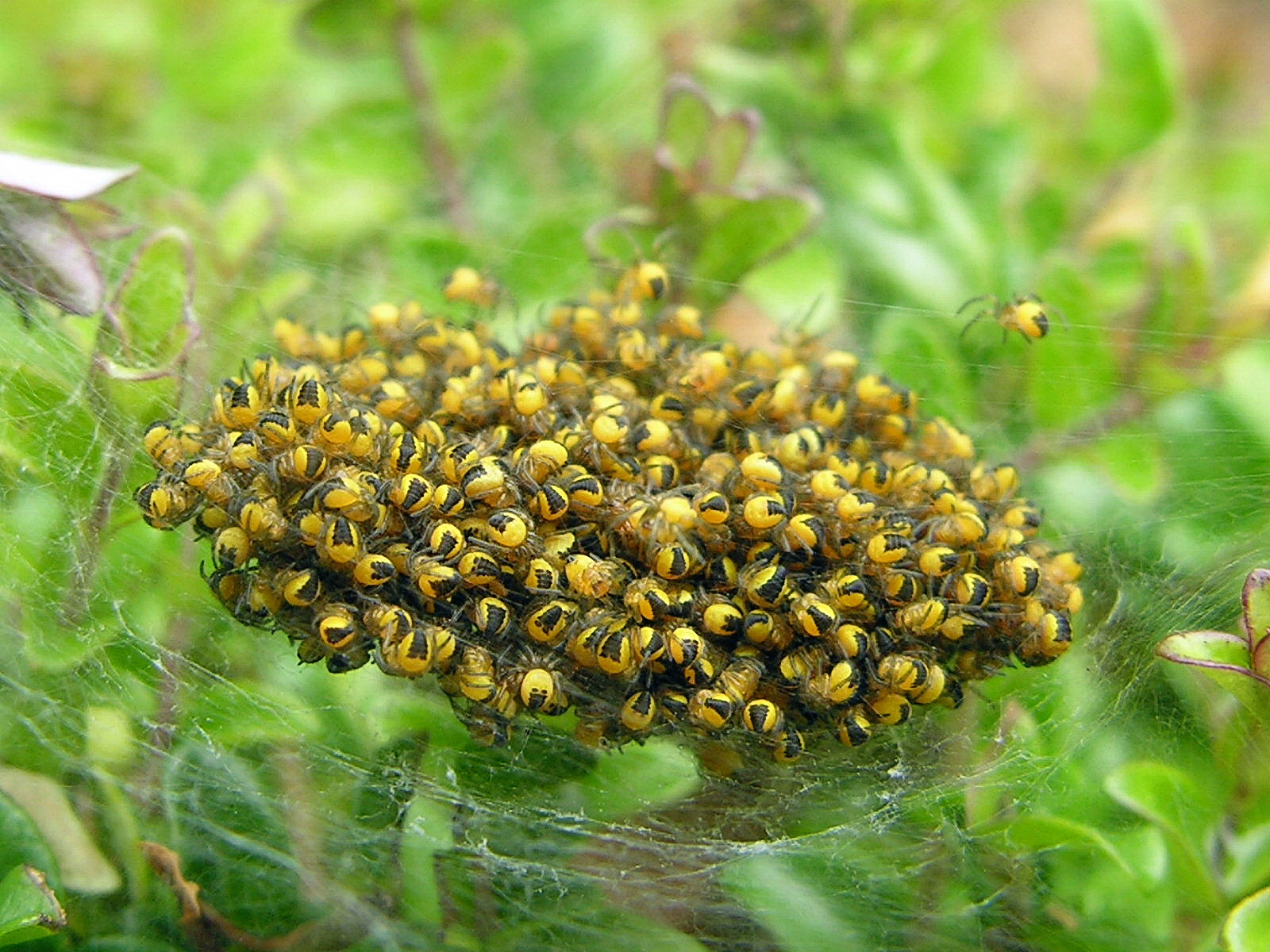 ninfas de Araneus diadematus, en Oroso, Oroso, Galiza